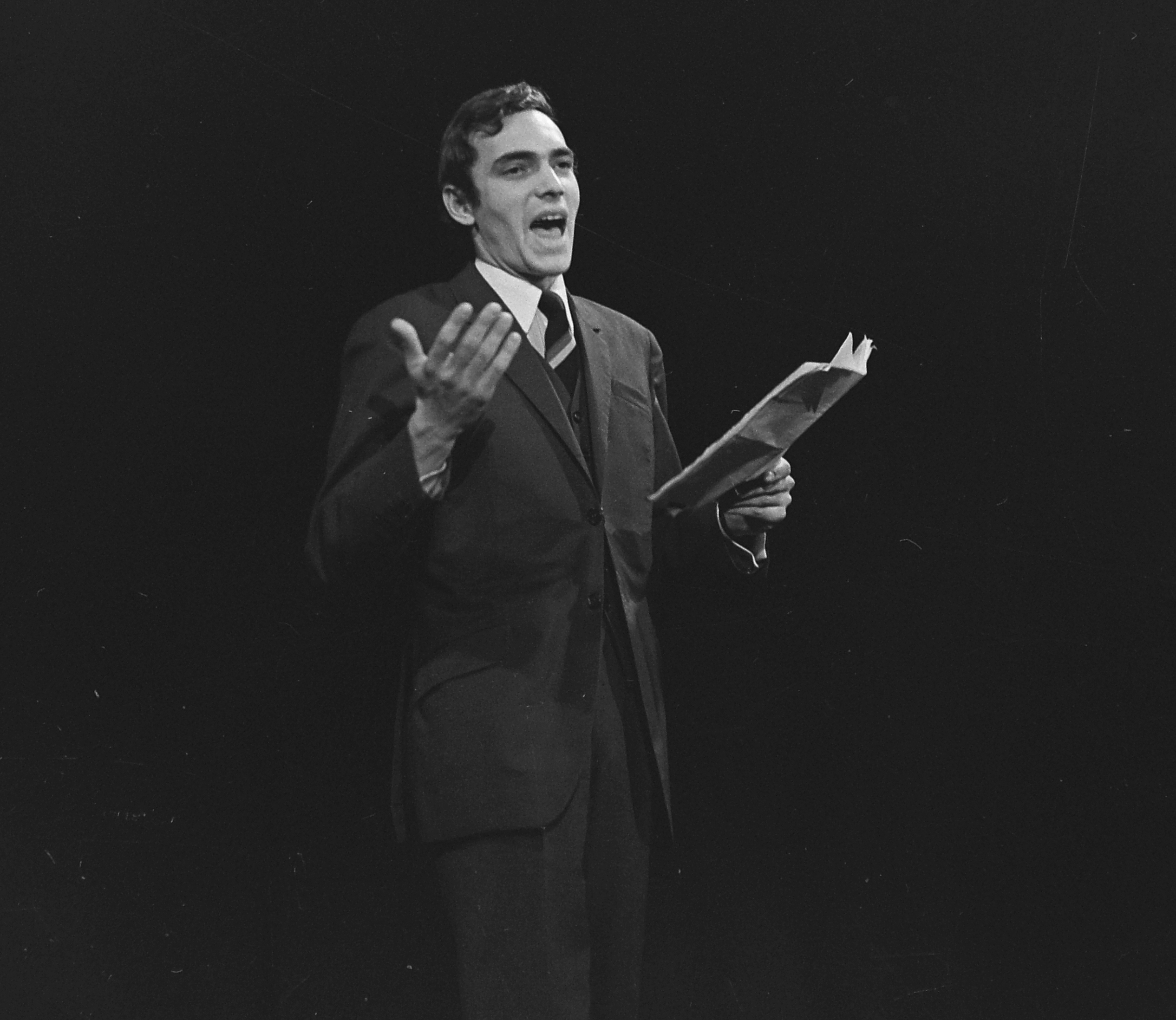 Benedek Miklós színművész. Location: Hungary, Budapest V. Tags: art of theater, celebrity, actor, Budapest Title: Benedek Miklós színművész.